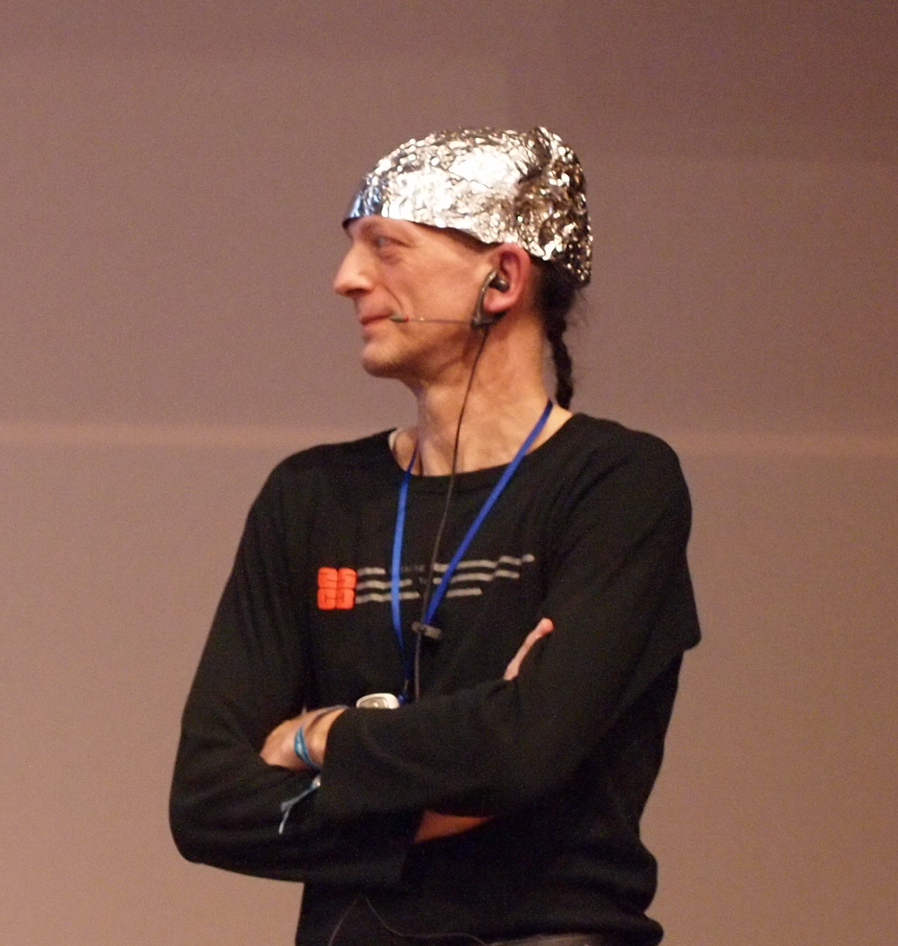 Mann mit Aluminium-Hut auf dem 30C3